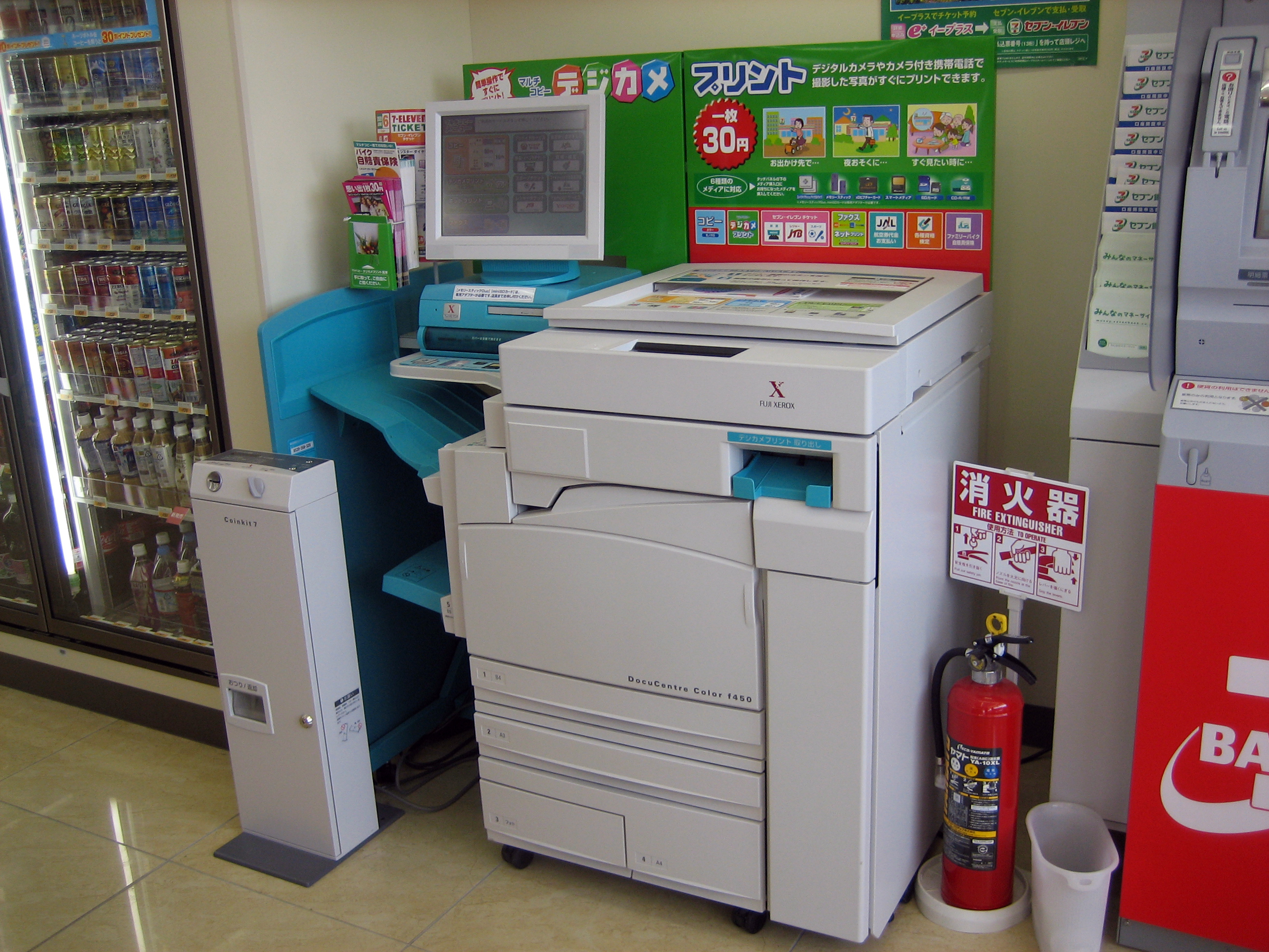 日本のコンビニエンスストア運営企業セブンイレブンの店舗に設置されているデジタルカメラの写真や文書などをコピーまたはプリントするマシン。